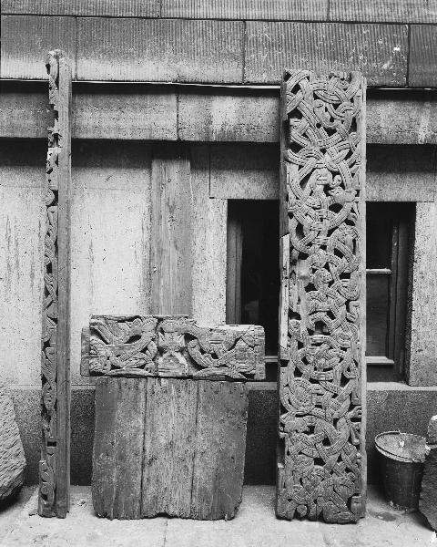 Överstycke och delar av dörromfattning från den gamla stavkyrkan. Kategori: (01) Exteriörer, detaljerÖverstycke och delar av dörromfattning från den gamla stavkyrkan.